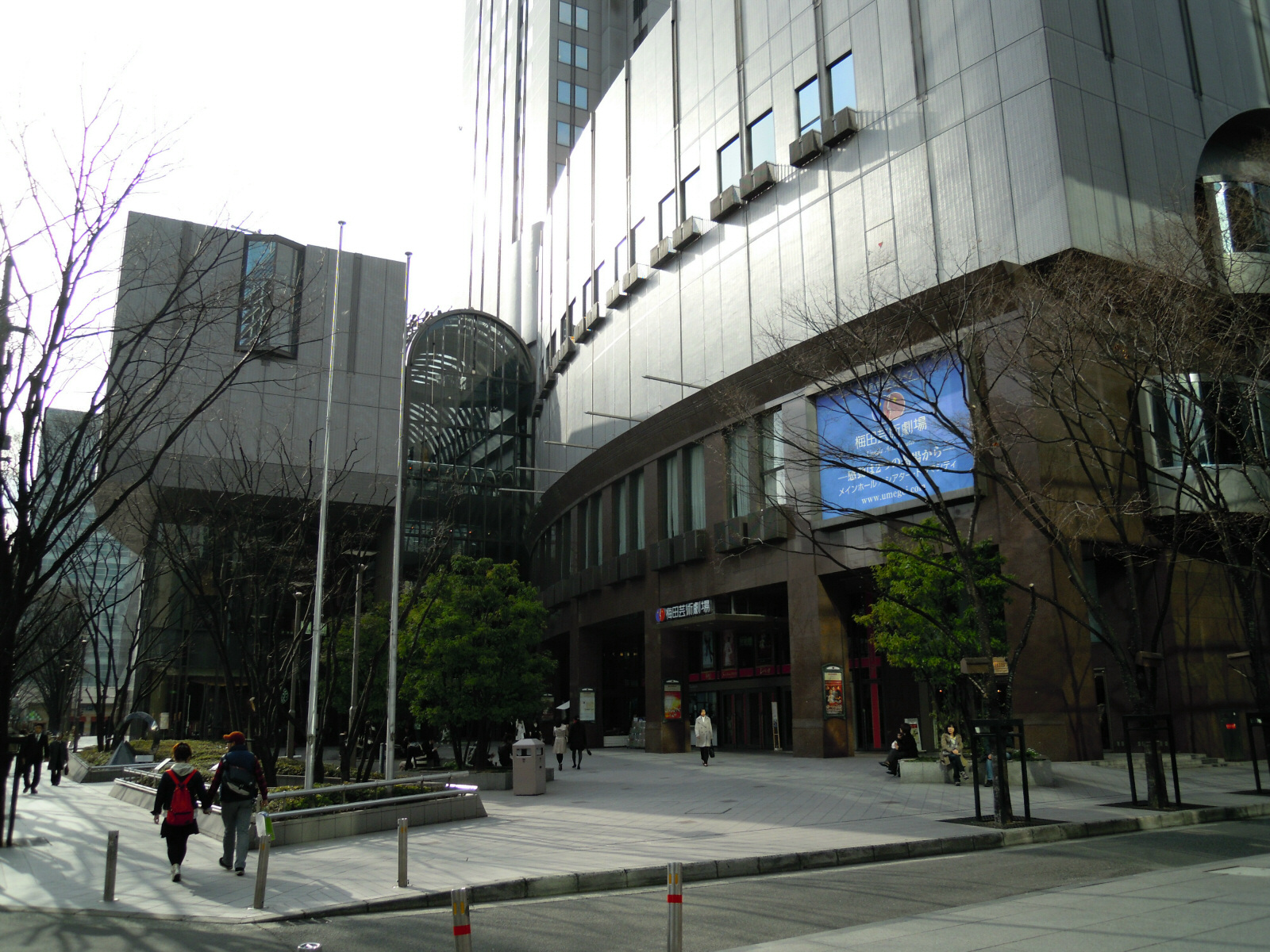 Umegei